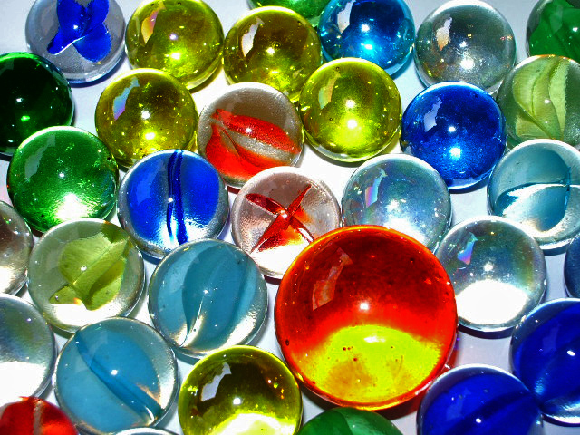 Gliese Jicken